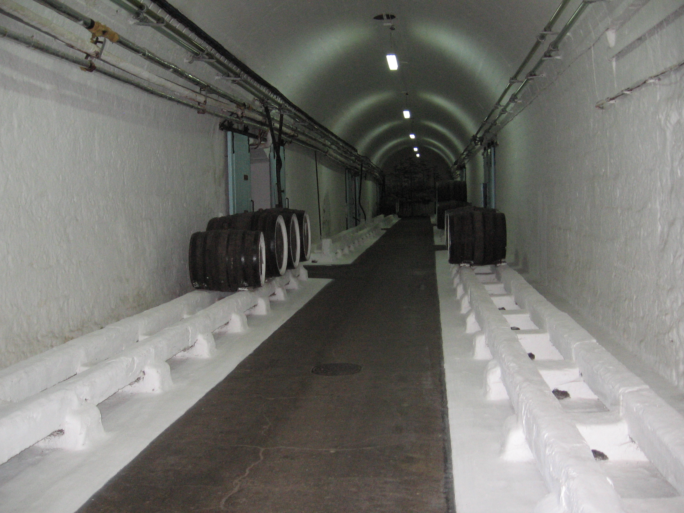 Фото